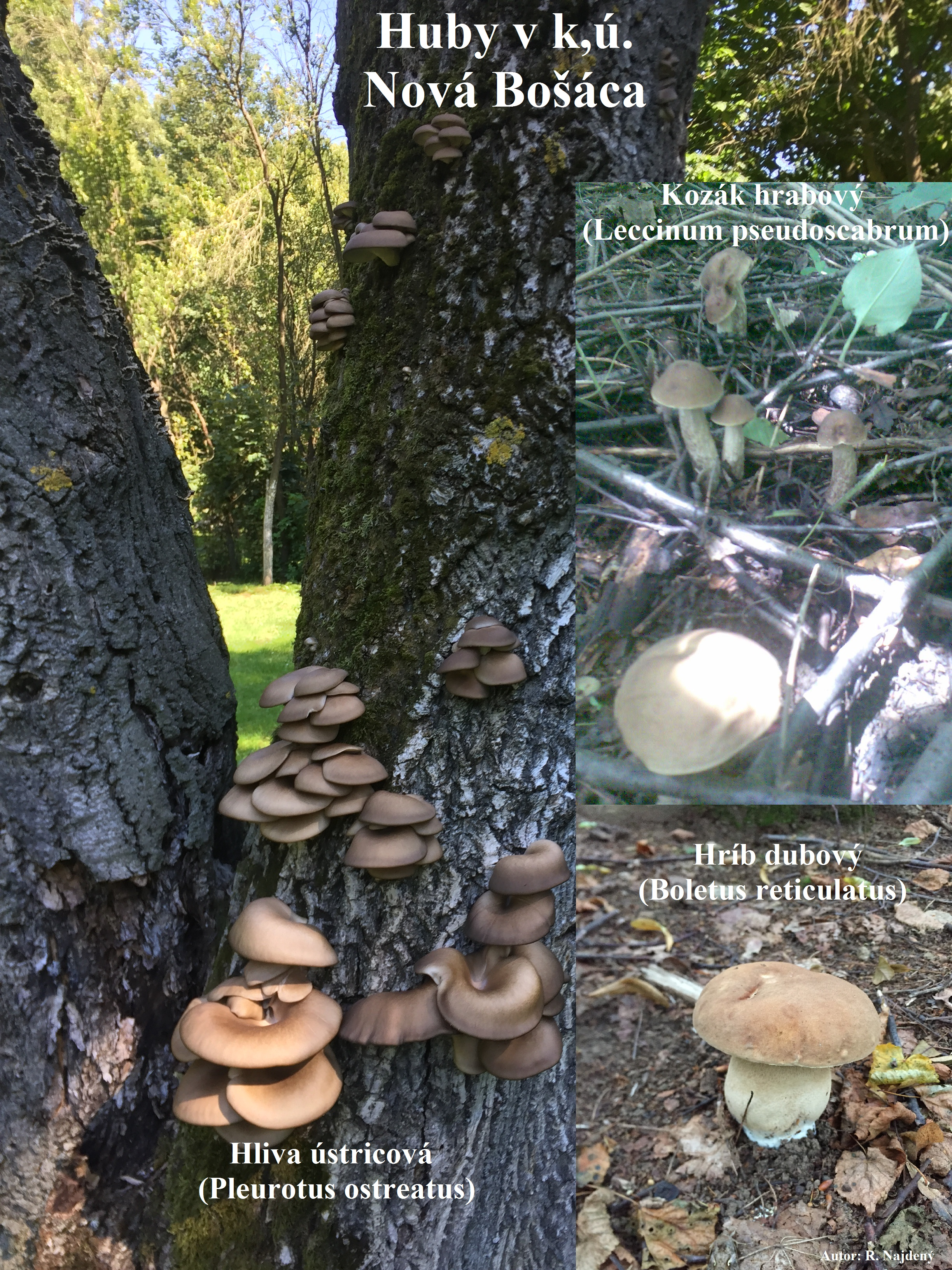 Huby v Novej Bosáci